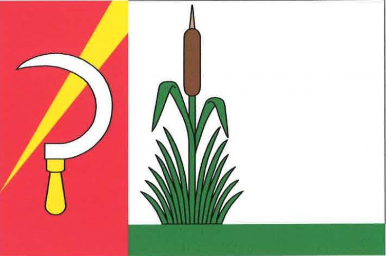 vlajka, Podbořanský Rohozec, okres Louny